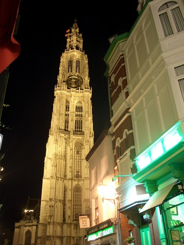 Catedral d'Anvers - Torre de nit